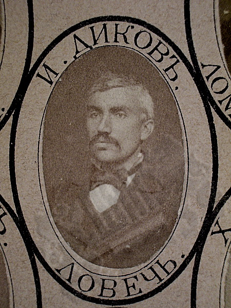 Foto von Ivan Dikov Vlahov aus der Bildertafel mit allen Volksvertretern in der Gründungsversammlung, 10.02.1879